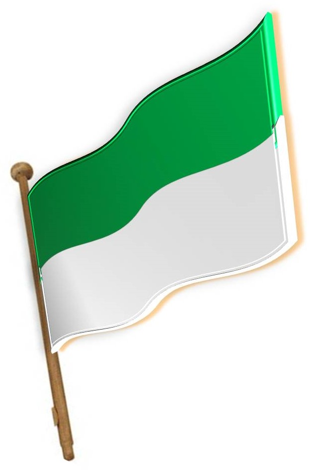 Bandera de Rurrenabaque